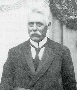 Burgemeester Edmond Bruyneel (1858-1923) van Zeveren - Deinze - Oost-Vlaanderen - Vlaanderen - België